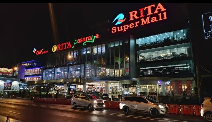 Rita mall purwokerto